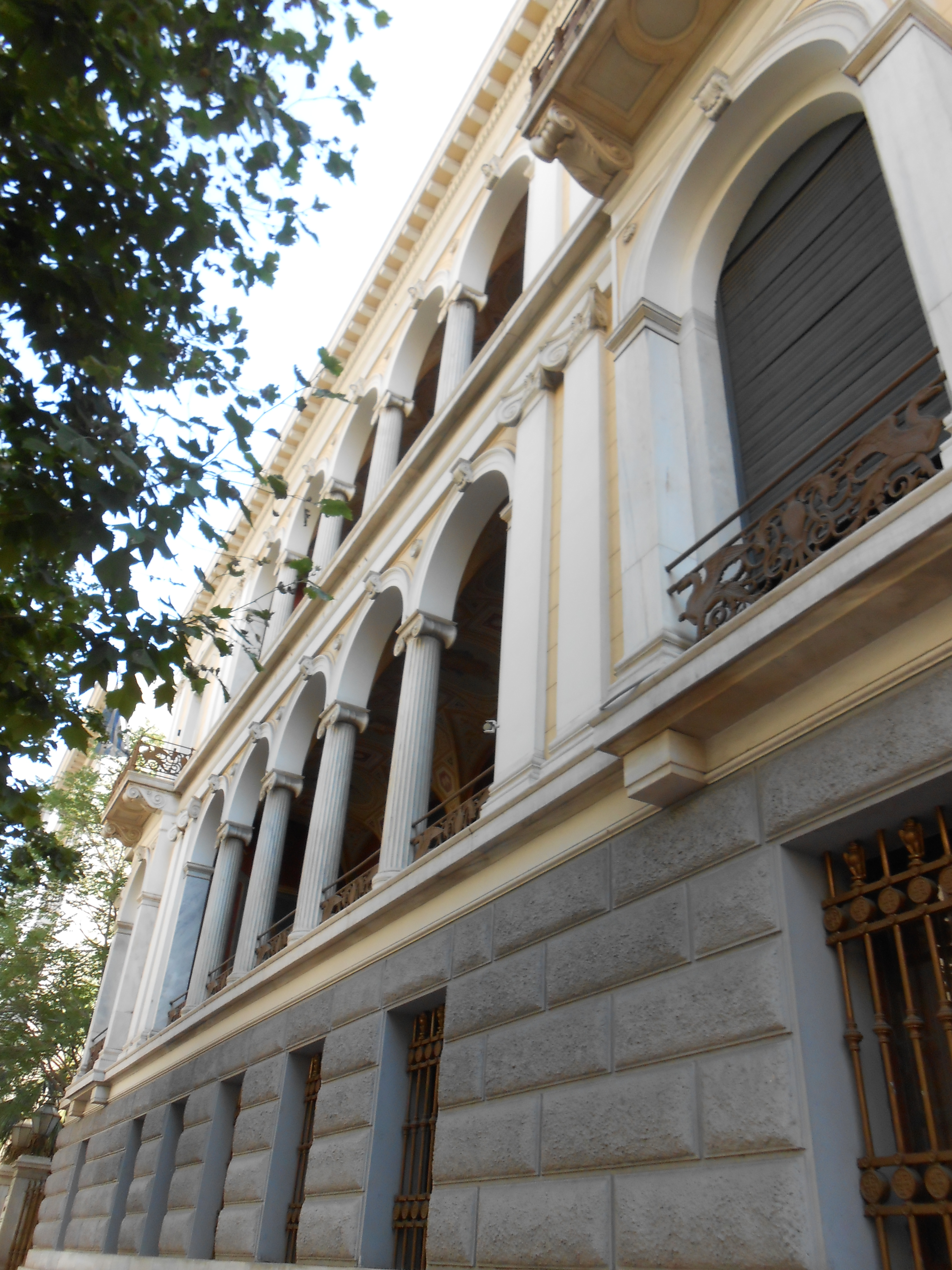 Museo numismatico di Atene